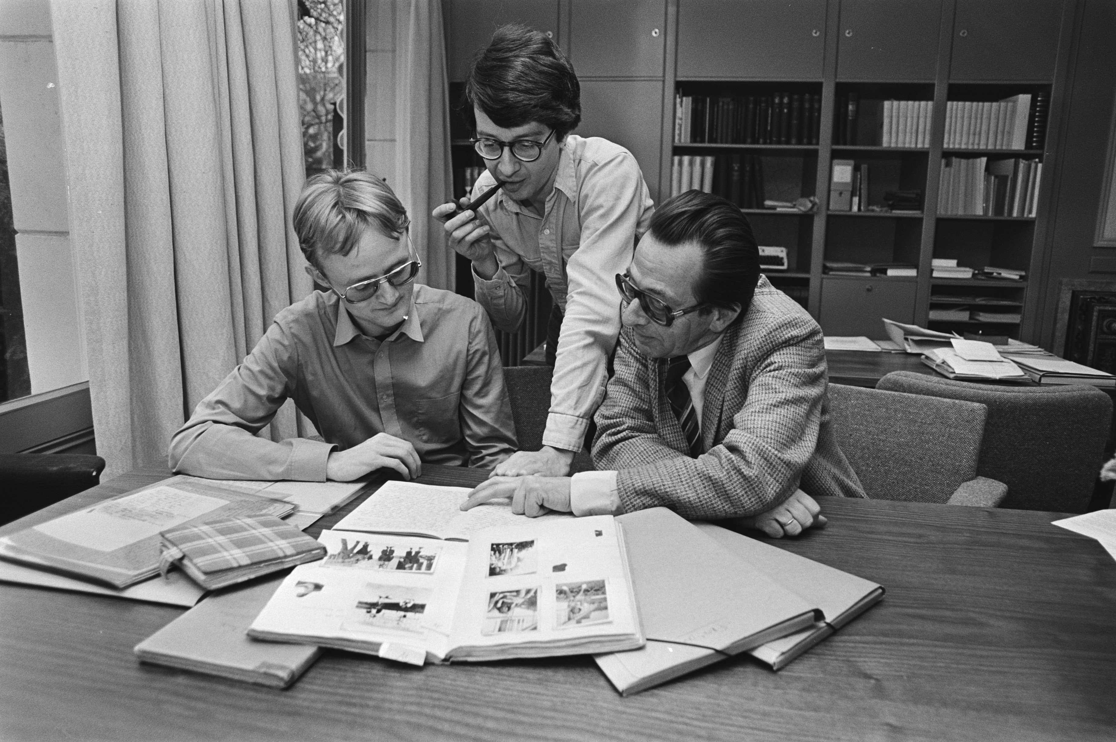 V.l.n.r. Rijksinstituut voor Oorlogsdocumentatie medewerkers Gerrold van der Stroom en David Barnouw en directeur A.H. Paape die zich met de uitgaven van het oorspronkelijke manuscript van het dagboek van Anne Frank bezig zal houden